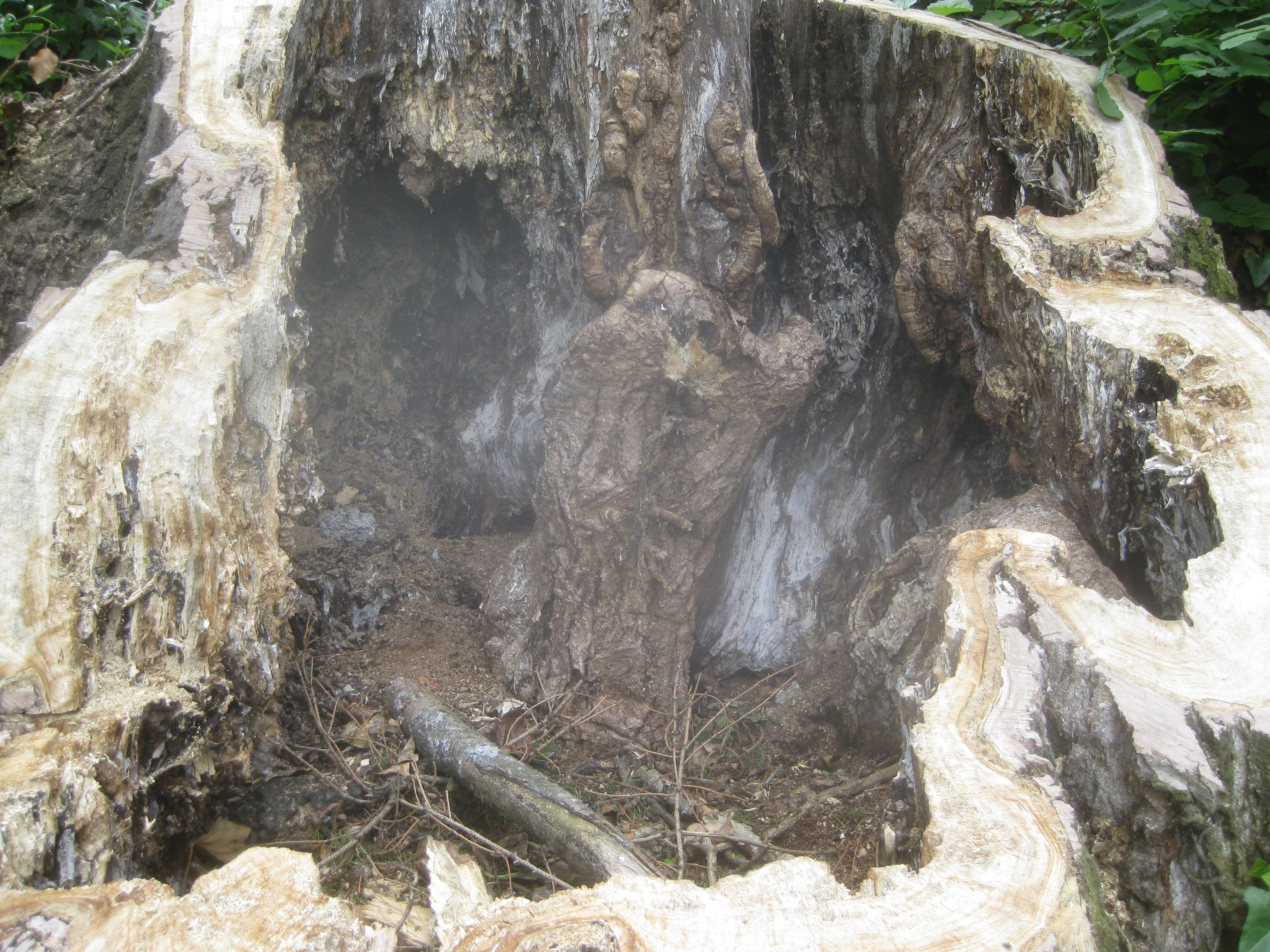 Friedhof Heslach, gefällter Baumriese.